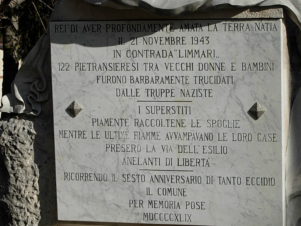 Lapide in ricordo dei caduti di Pietransieri Foto personale